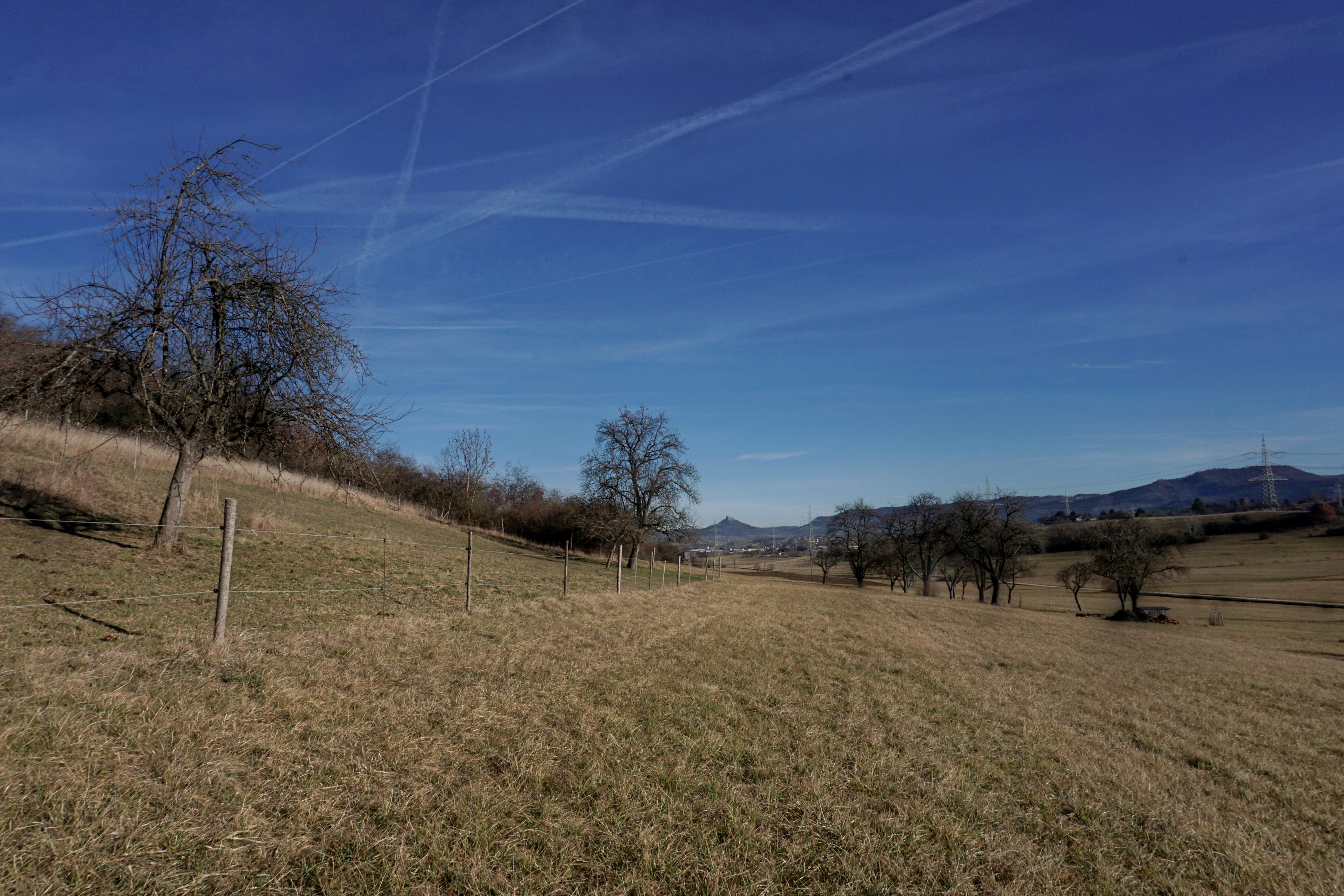 Wiesenlandschaft bei Balingen